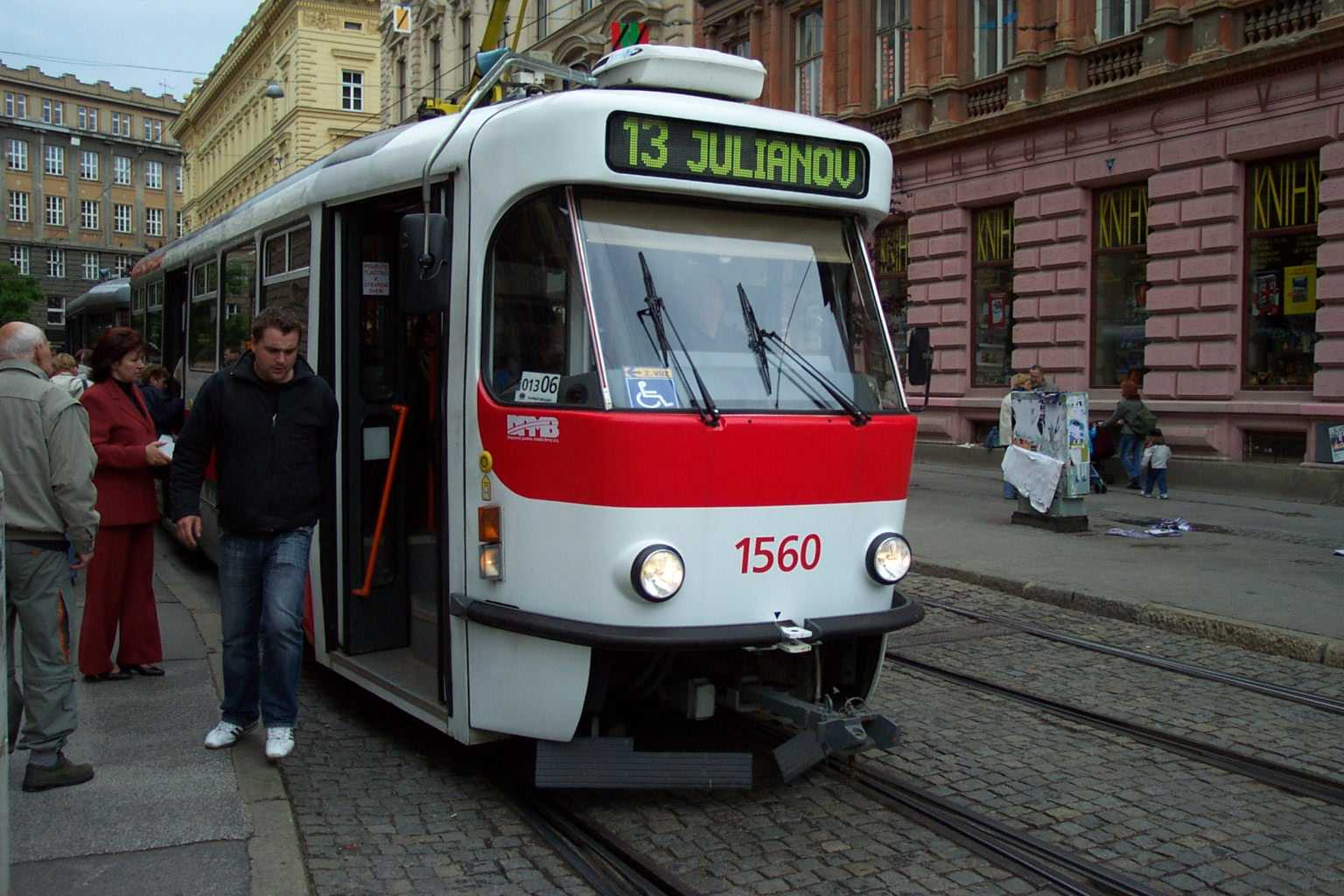 T3P tram in Brno - Tramvaj typu T3P v Brně